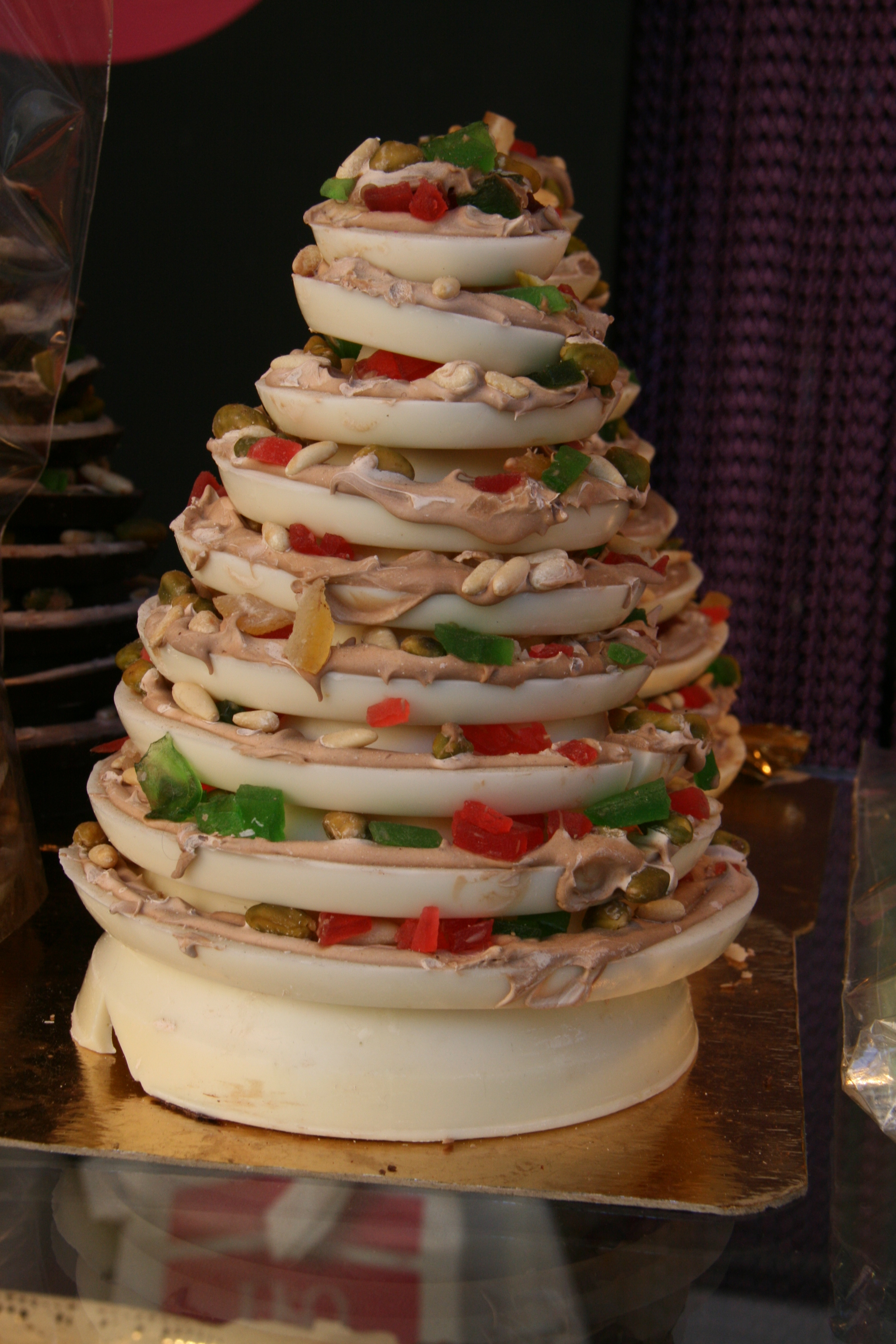 Torres de Chocolate — San Onofre España.